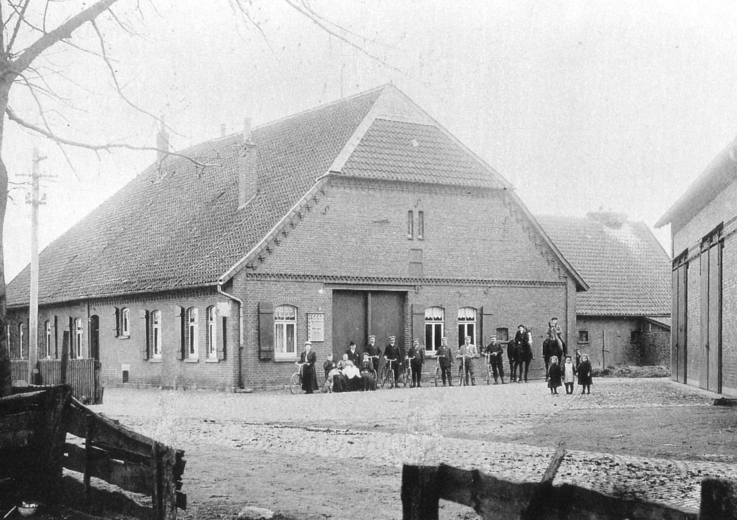 Pinkenburg